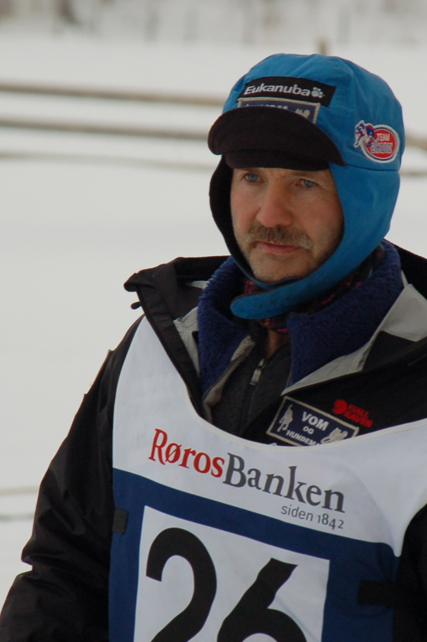 Vinneren av Femundløpet F600 2014 Robert Sørlie på vei inn til sjekkpunkt Tolga